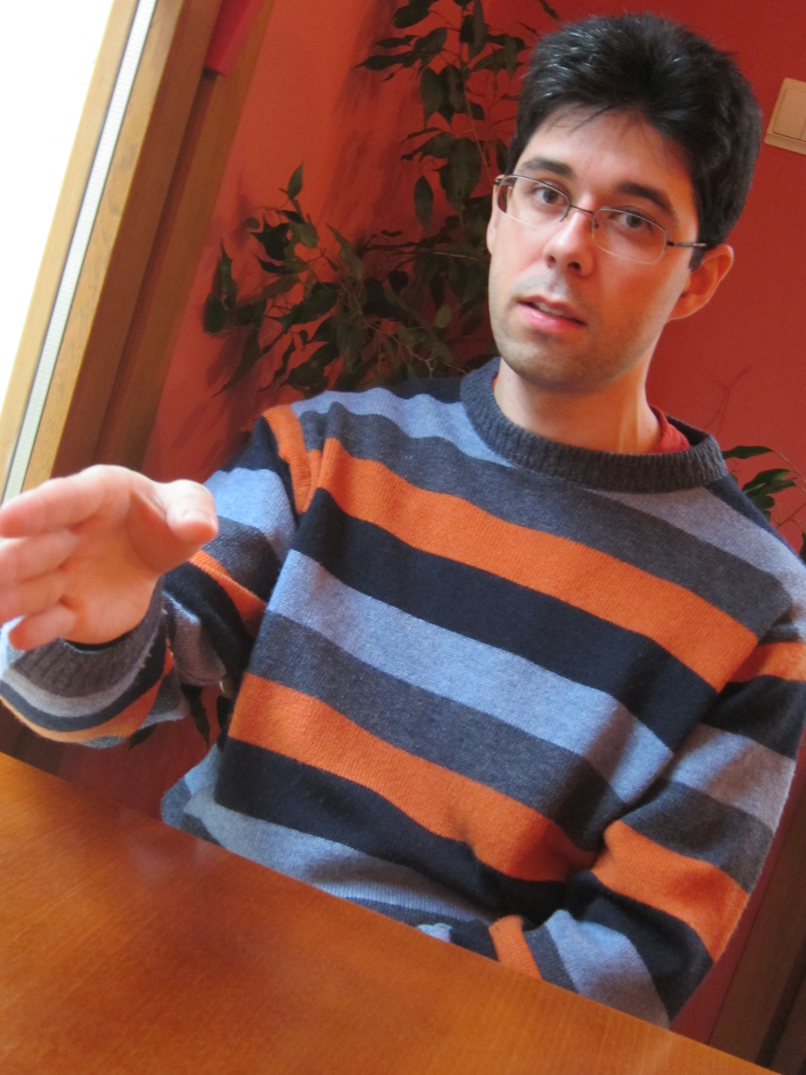 Мирослав Пенков - писател